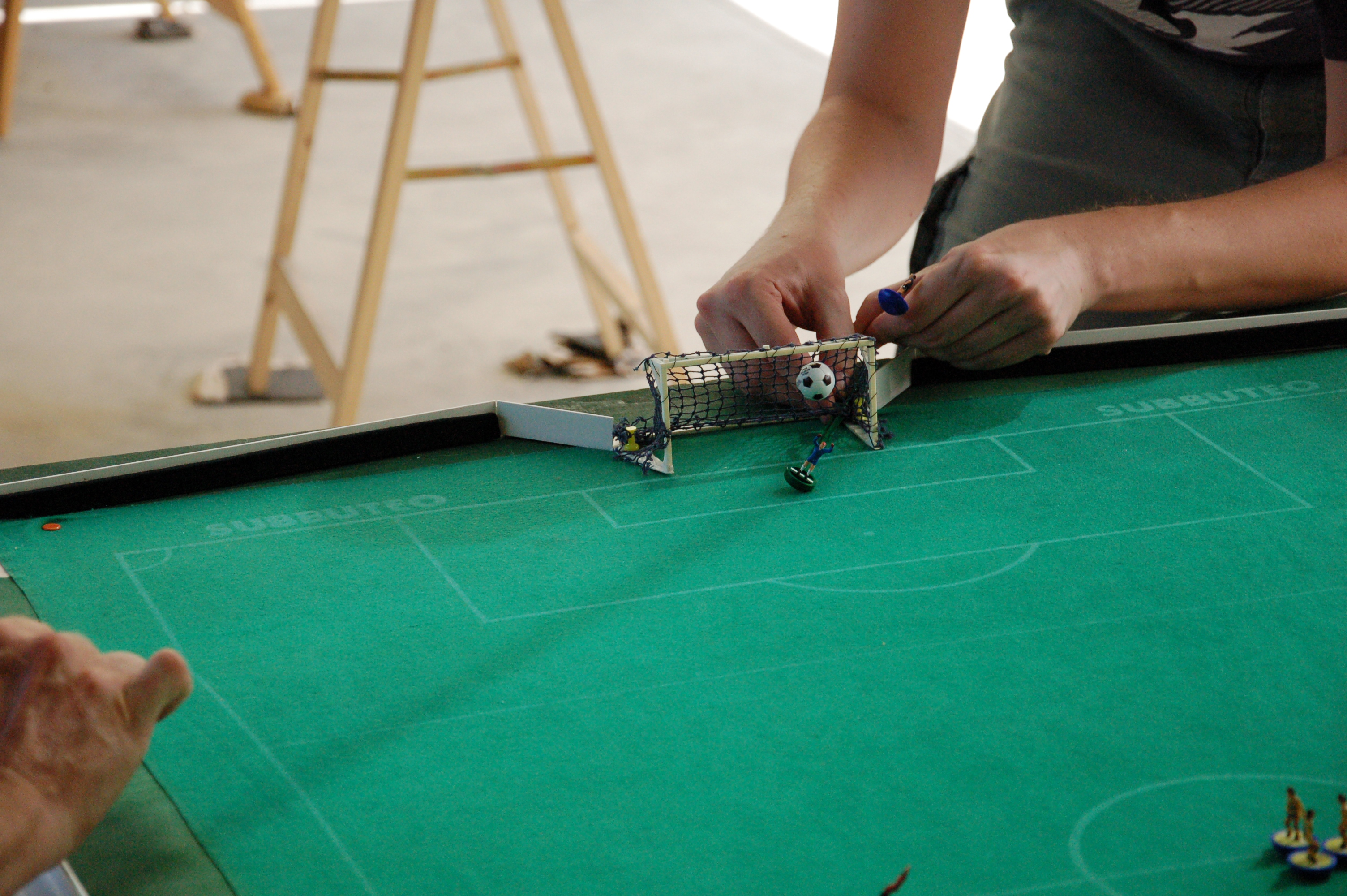 Uno shoot out durante una partita di OldSubbuteo